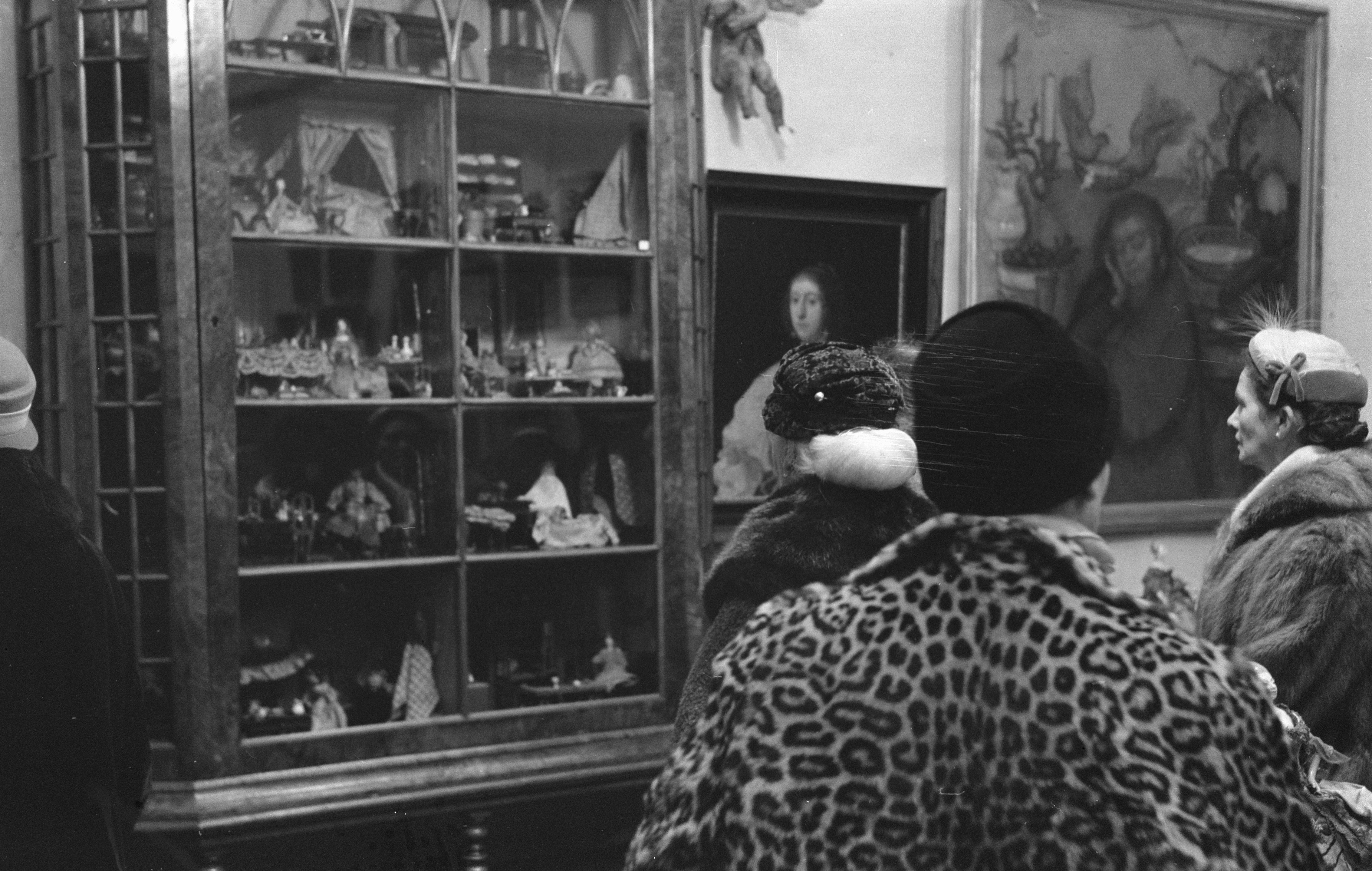 Collectie / Archief : Fotocollectie Anefo Reportage / Serie : [ onbekend ] Beschrijving : Kijkdag bij de kunstcollectie van Lizzy Ansingh , overzi van de veilinghal met links een laat 18 eeuws poppenhuis Datum : 26 februari 1960 Trefwoorden : kunstcollecties, overzichten, poppenhuis, veilinghallen Persoonsnaam : Ansingh, Lizzy Fotograaf : Pot, Harry / Anefo Auteursrechthebbende : Nationaal Archief Materiaalsoort : Negatief (zwart/wit) Nummer archiefinventaris : bekijk toegang 2.24.01.05 Bestanddeelnummer : 911-0529 Reacties Geplaatst door Maaike op 08 juni 2014 - 18:40. Kijkdag bij de kunstcollectie van Lizzy Ansingh welke in maart geveild gaat worden Locatie: Arti Plaats: Amsterdam, Noord-Holland